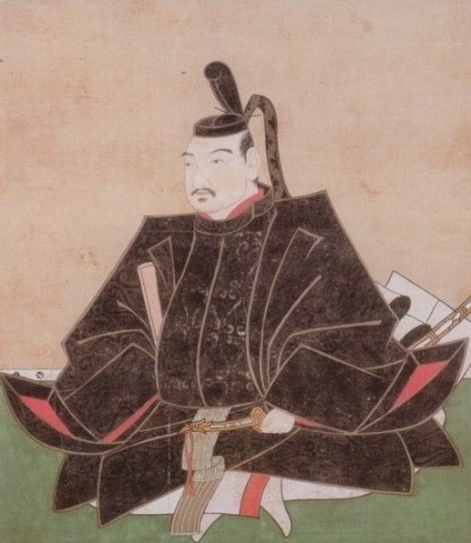 生駒一正の肖像。